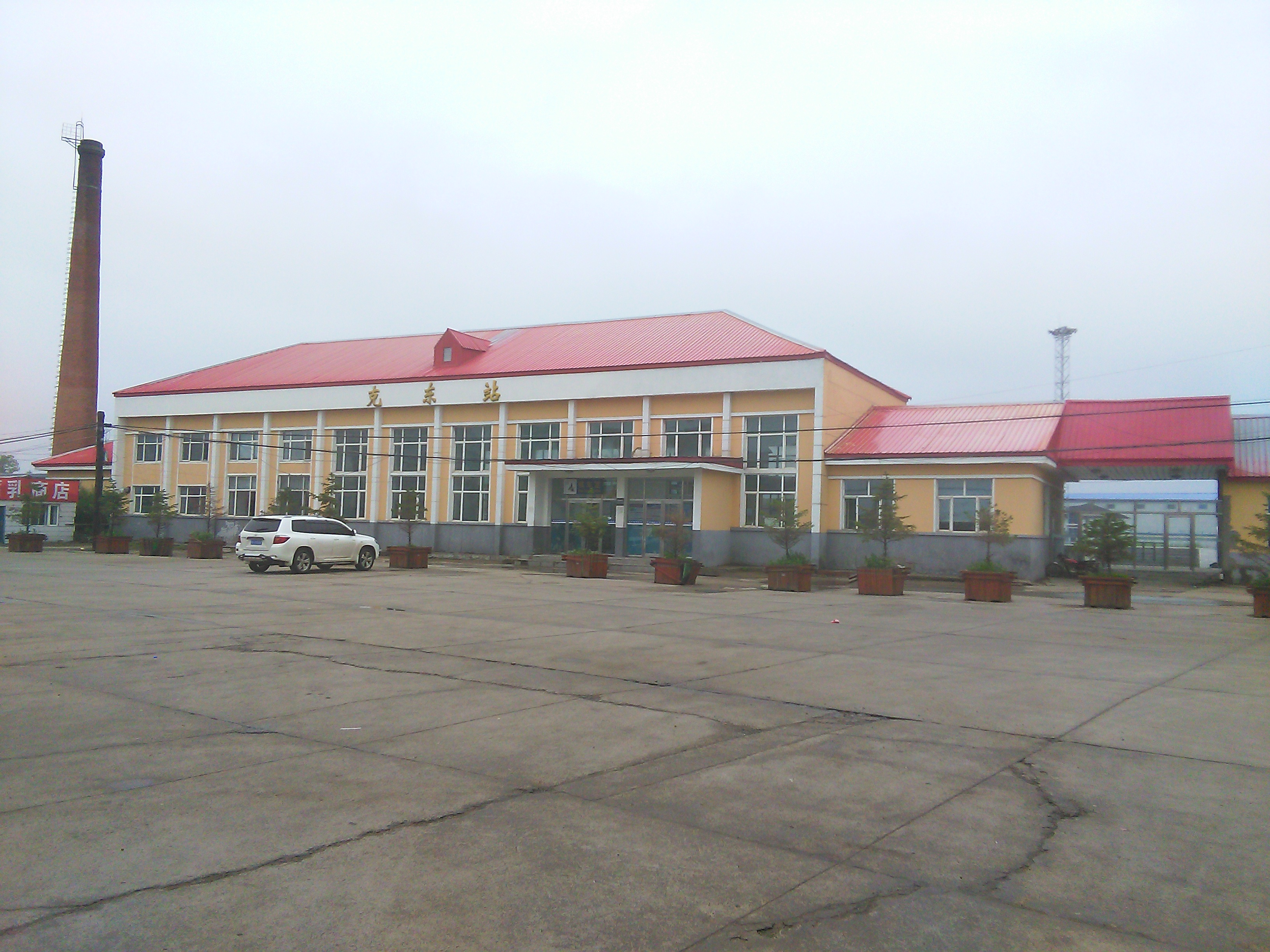 克东火车站2017